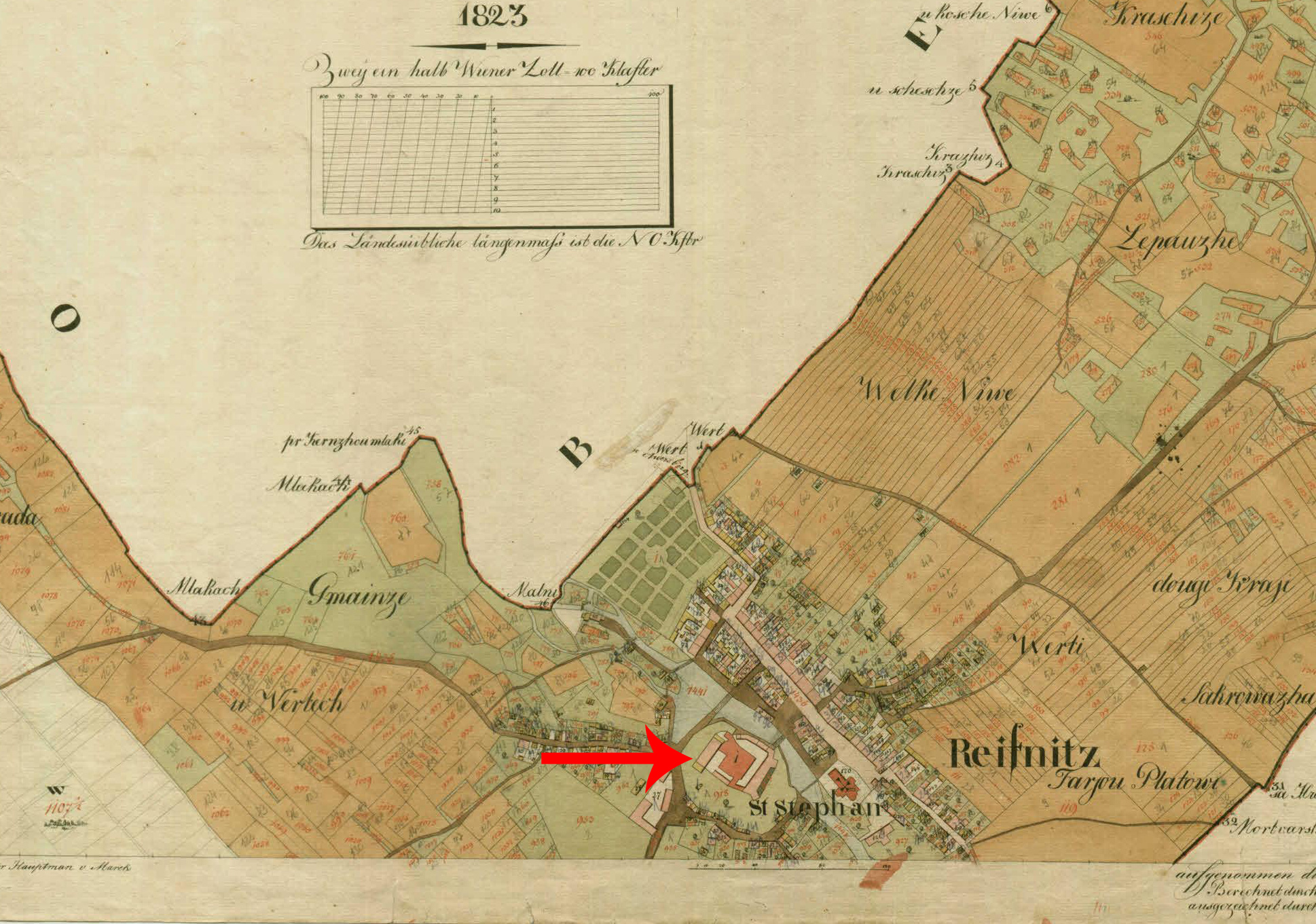 Grad Ribnica na franciscejskem katastru za Kranjsko